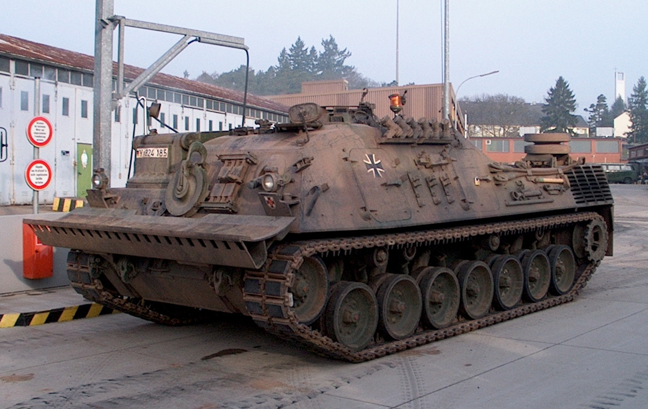 Bergepanzer 2 auf Leopard 1 Fahrgestell - Seitenansicht